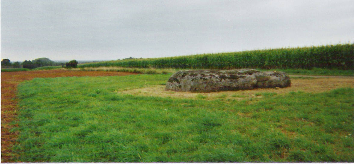 Le menhir du palet à Saint-Benoist-sur-Mer.